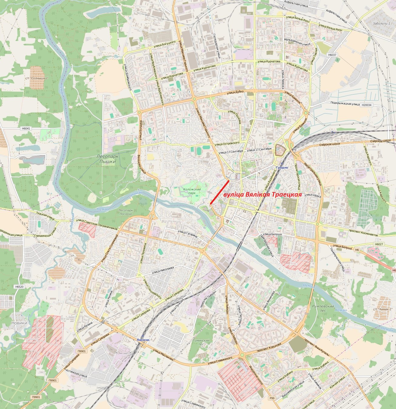 Вуліца Вялікая Траецкая на мапе Гродна. Файл зроблены на падставе OpenStreetMap. licence - Creative Commons Attribution-ShareAlike 2.0 Крыніца